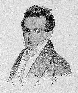 Pius Alexander Wolff, Zeichnung